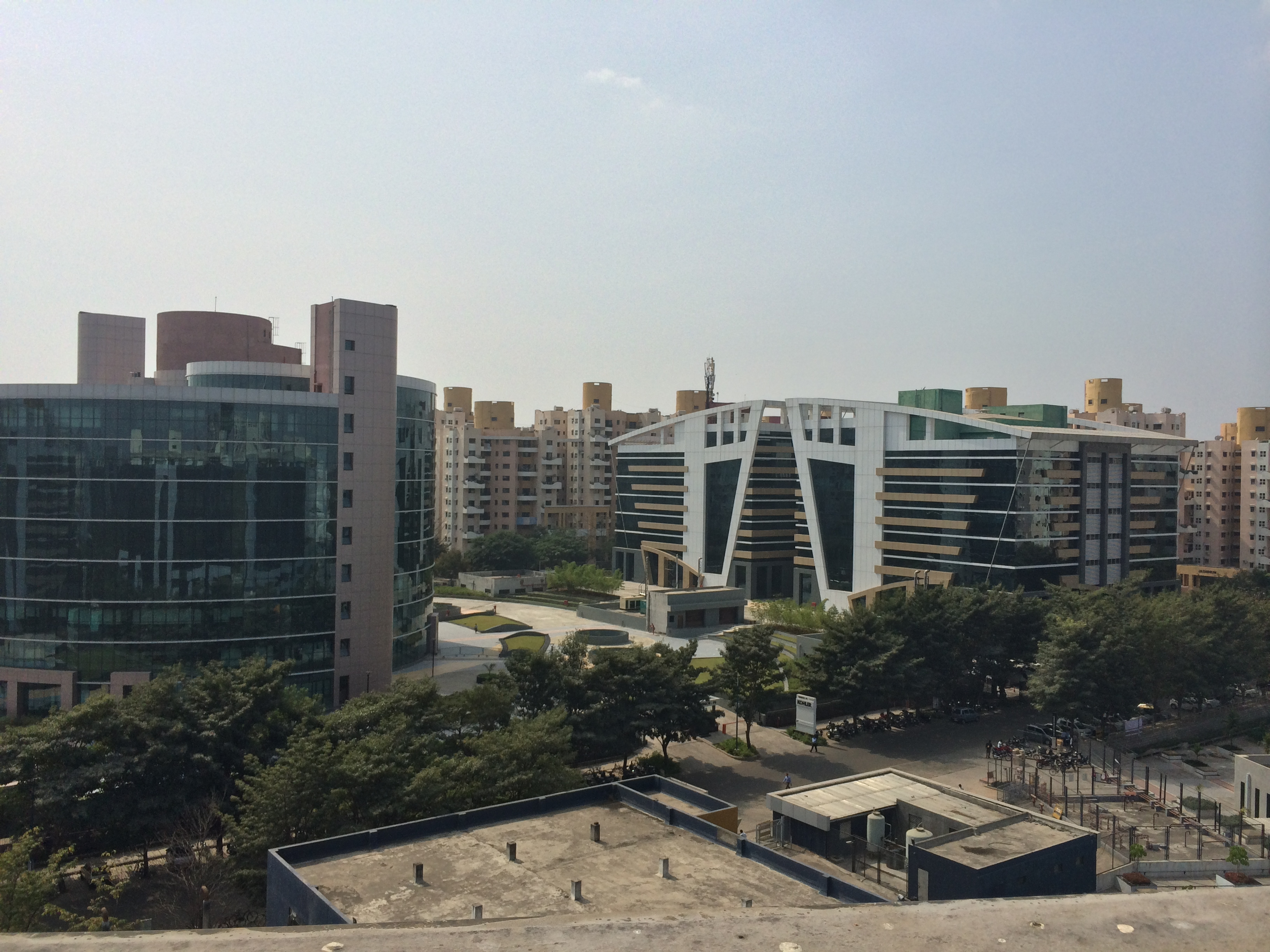 Magarpatta City, Pune Maharashtra India 2014